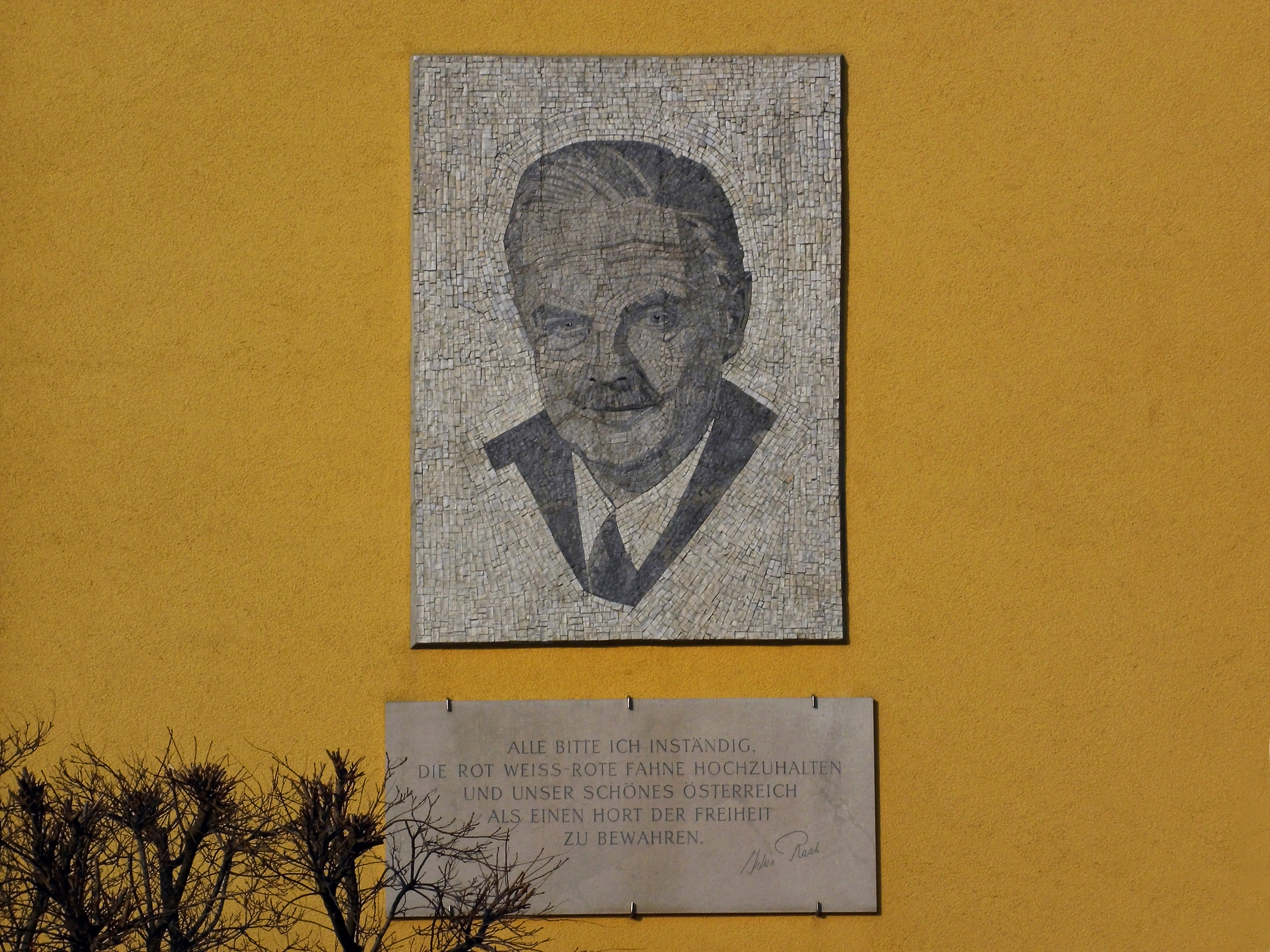 Das Julius-Raab-Mosaik am Haus Pönningerweg 4